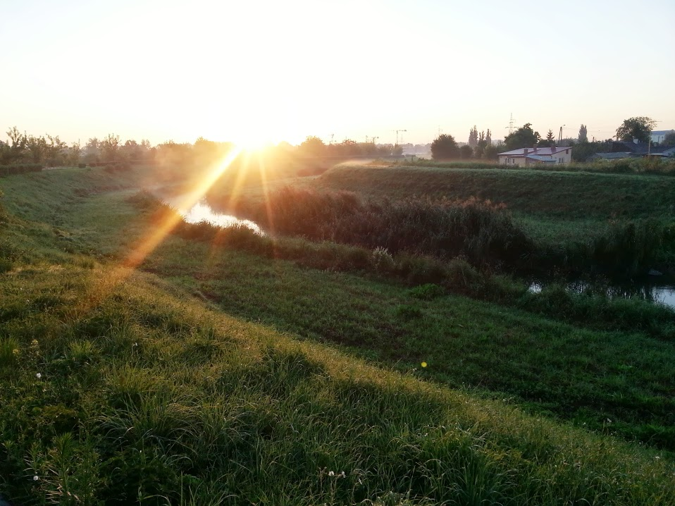 Widok na Dolinę Bystrzycy w Lublinie, w tle budujący się Stadion Miejski.